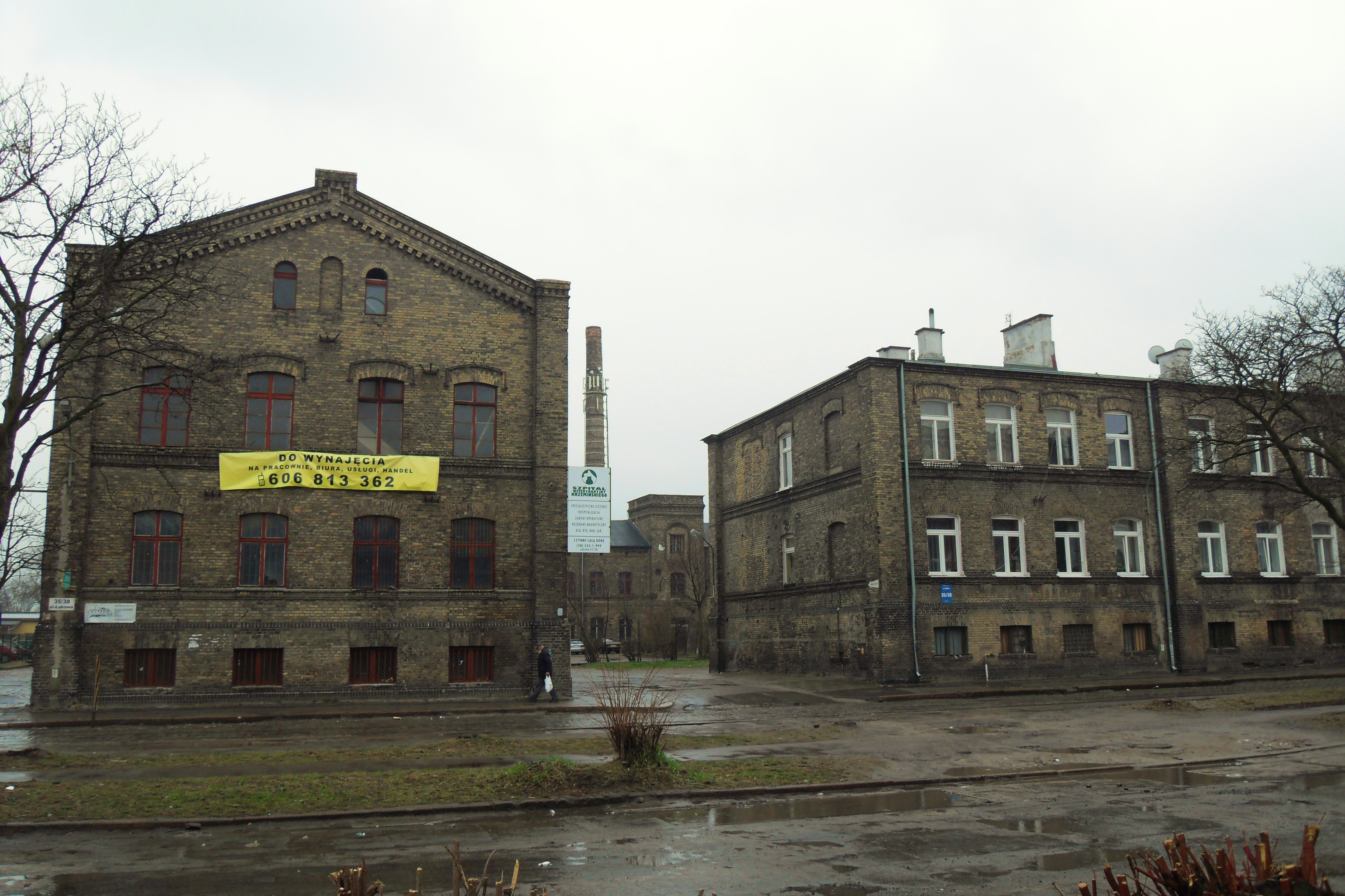 Gdańsk Dolne Miasto, ul. Łąkowa 35-38 (dawna fabryka karabinów).